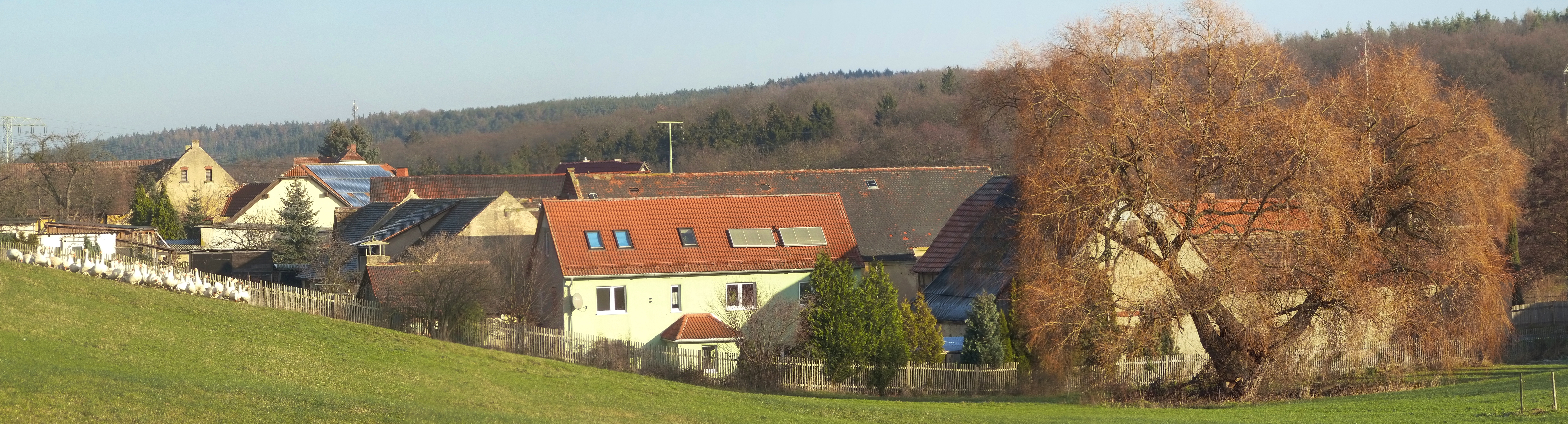 Dorfidylle in Tschorta